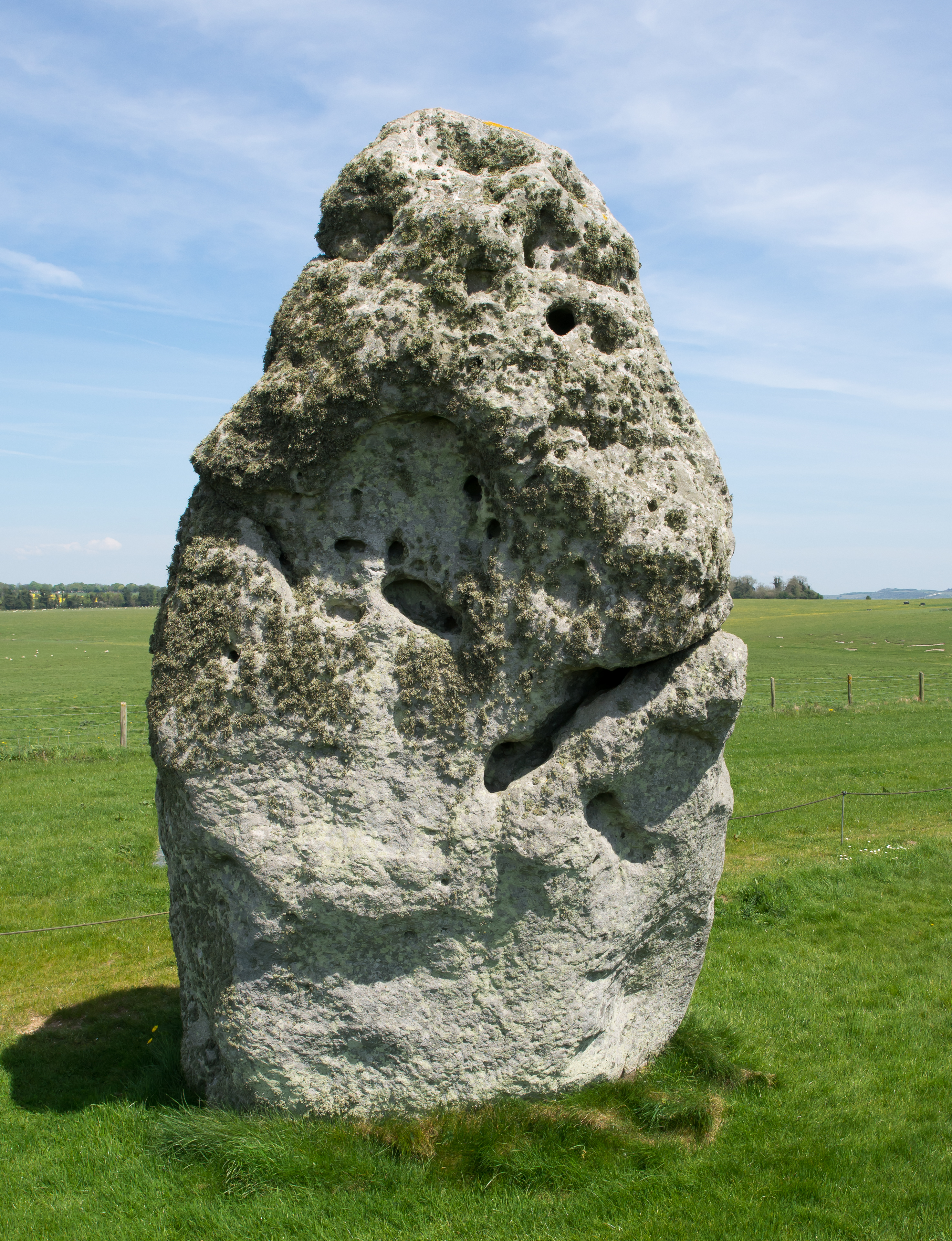 Stonehenge Heel Stone